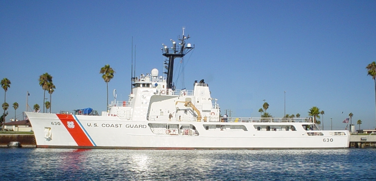 USCGC Alert (WMEC-630)